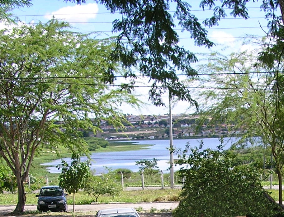 Açude de Bodocongó (o terceiro Açude de Campina Grande) visto de dentro da UFCG (não dah pra ver a UFCG na foto direito). Ano: 2006.